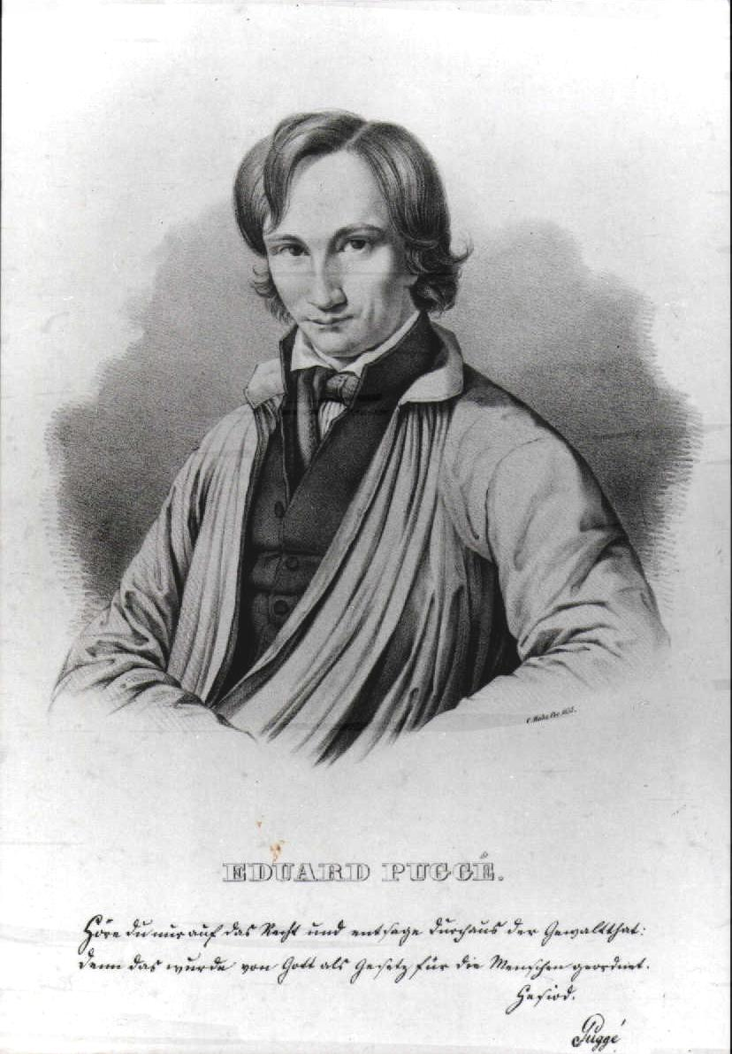 Eduard Puggé, Kreidelitografie